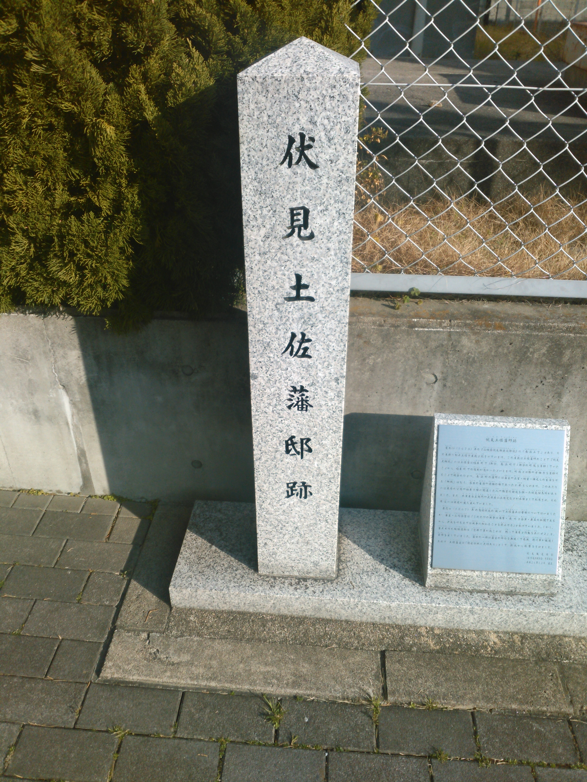 伏見土佐藩邸跡石碑